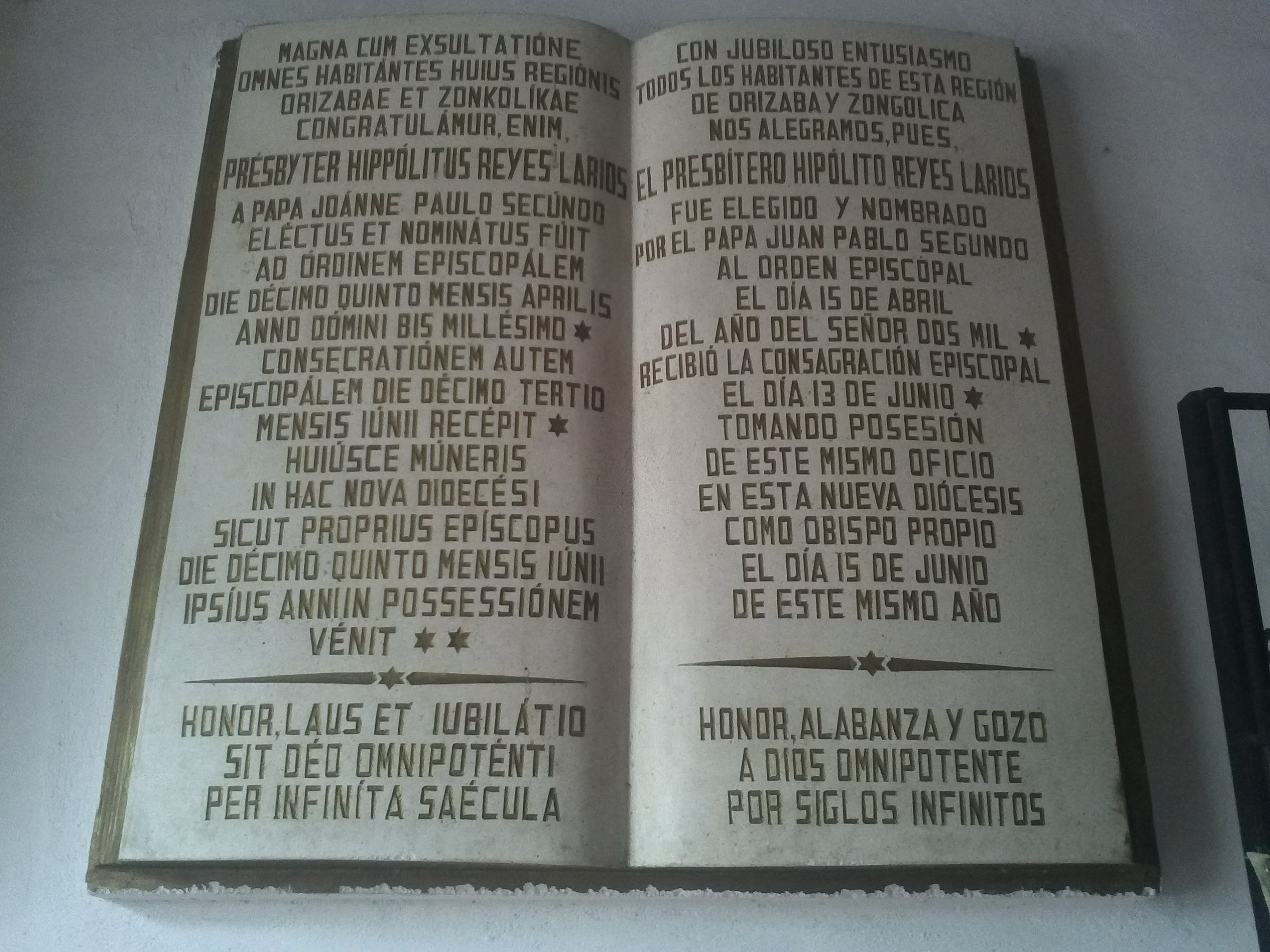 Placa conmemorativa de la fundación de la Diócesis de Orizaba